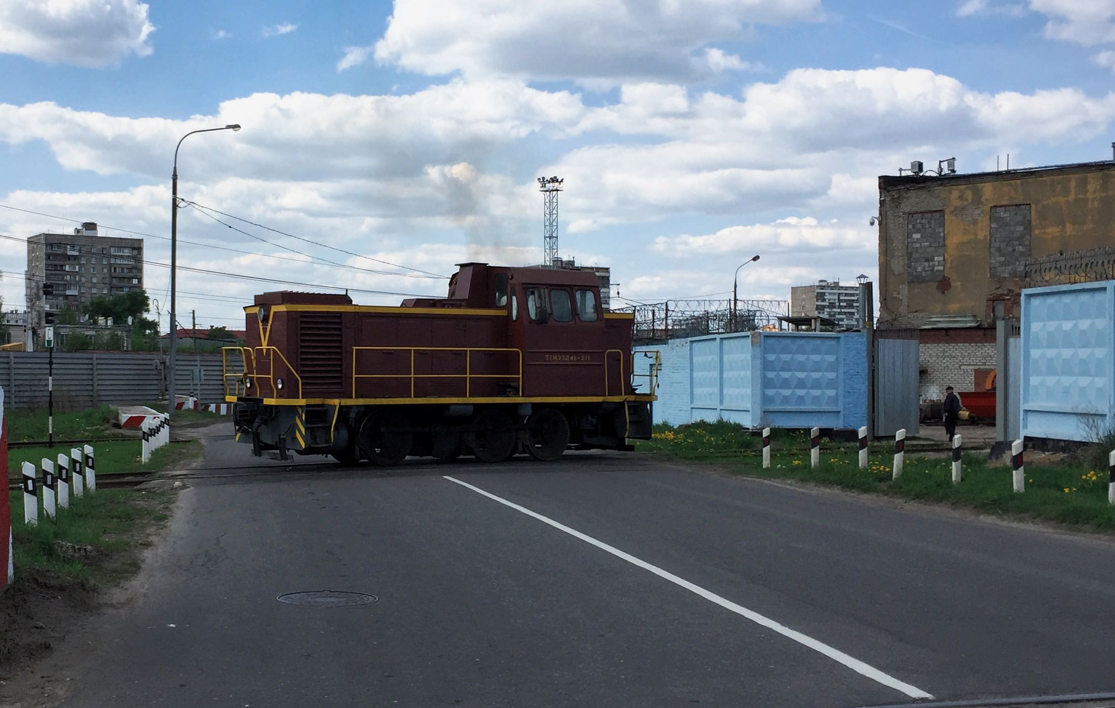 Золотая улица. Открытый железнодорожный переезд через веер путей к заводу "Салют". Вид на северо-запад, в сторону малого кольца МЖД и Лефортова.